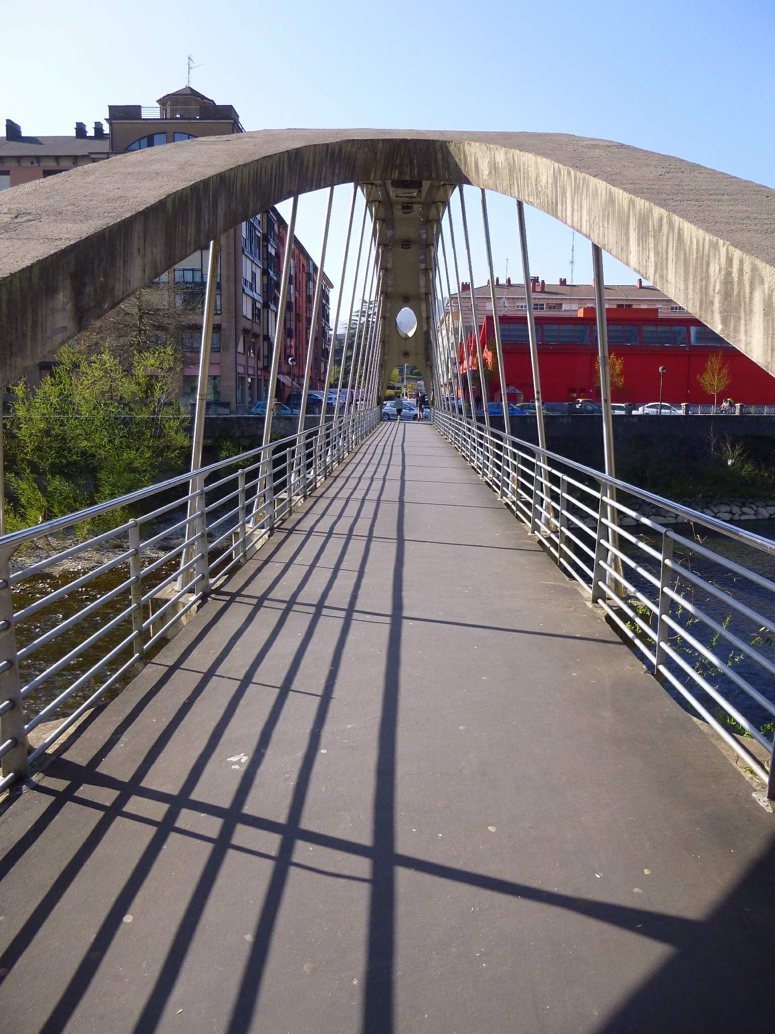 Puente sobre el río Oria (Tolosa)